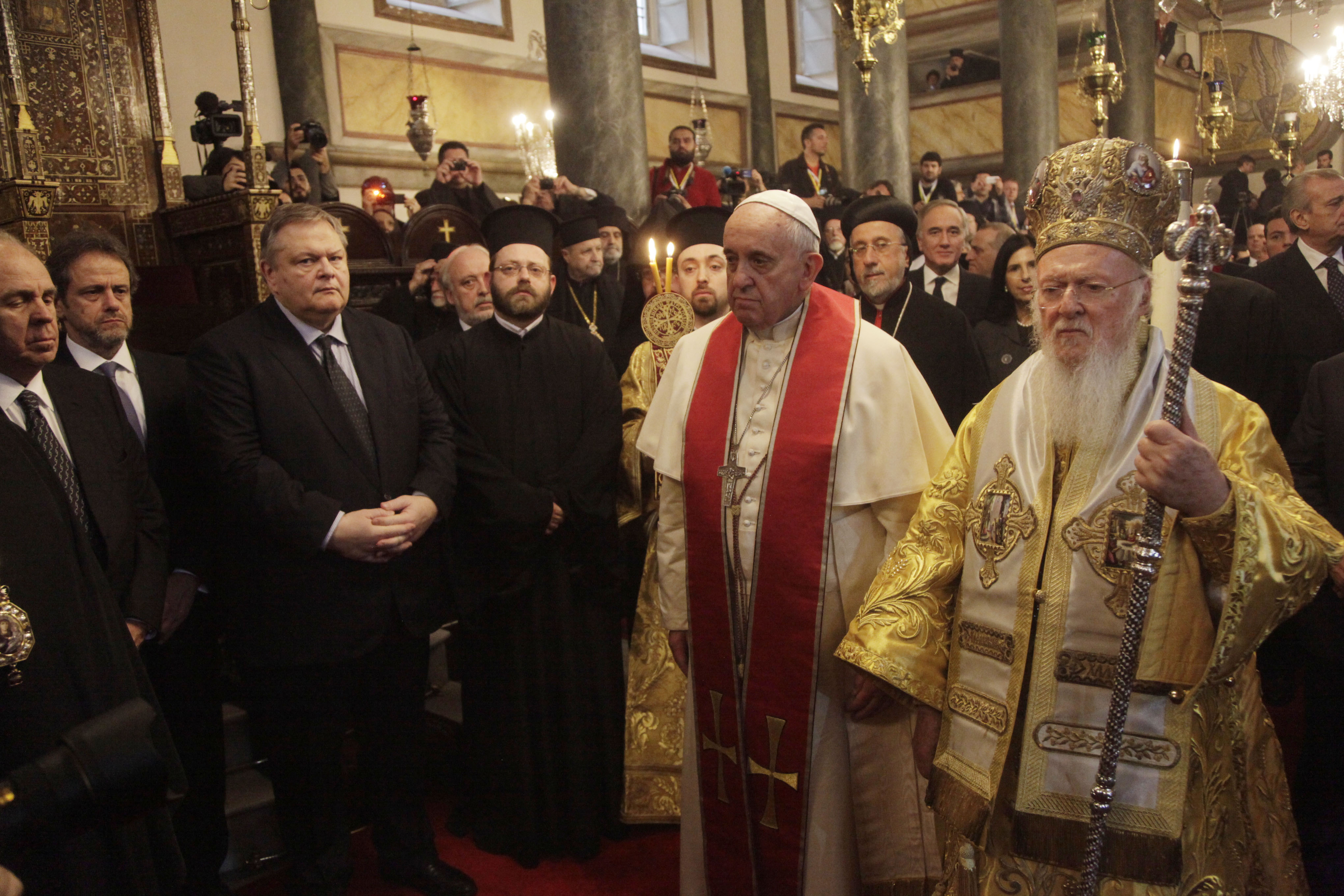 Στη Θρονική Εορτή του Οικουμενικού Πατριαρχείου, στην οποία παρευρίσκεται και η Αυτού Αγιότητα, ο Πάπας Φραγκίσκος. ΠΗΓΗ: Eurokinissi